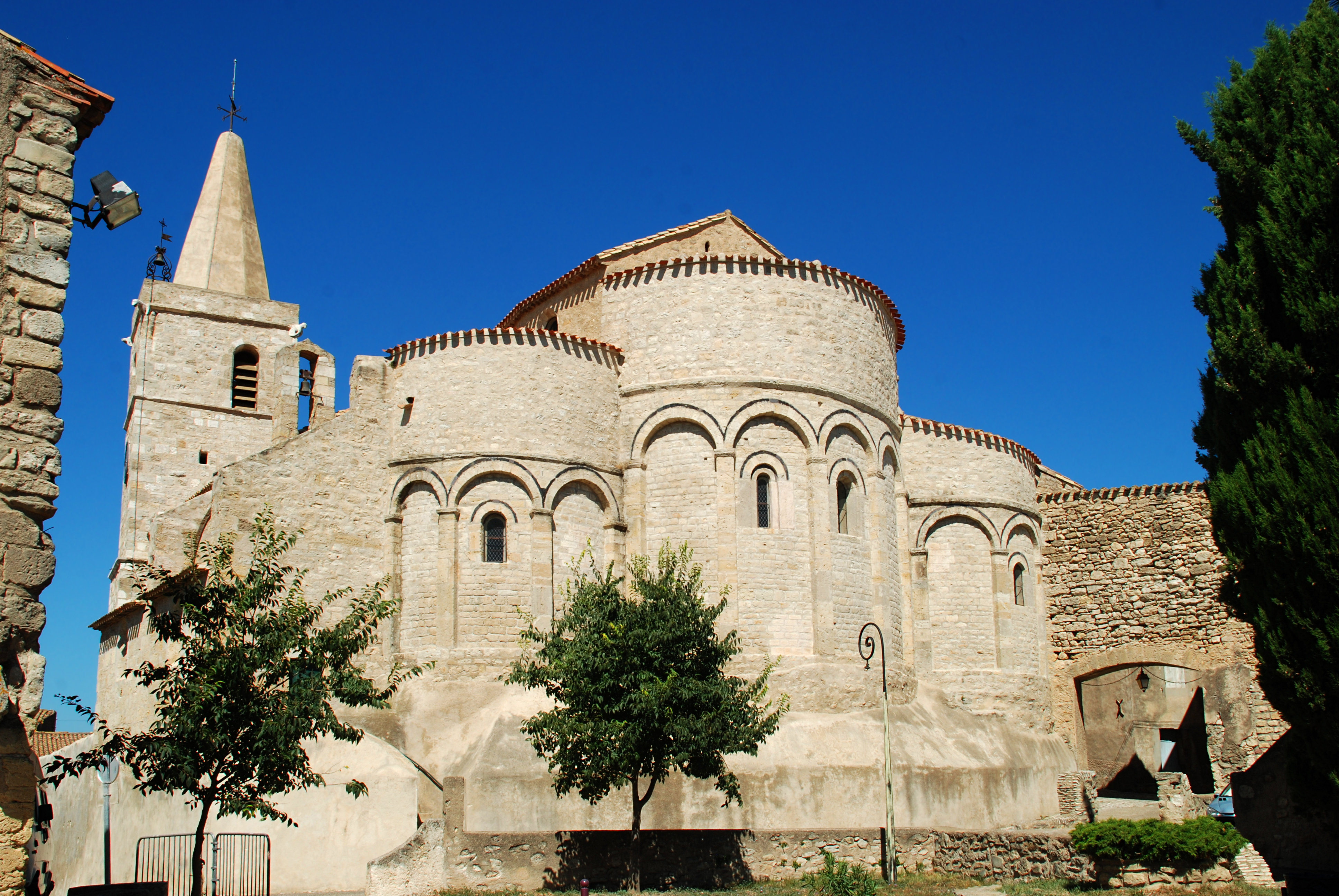 France - Languedoc - Aude - Église Saint-Jean l’Évangéliste d'Ouveillan